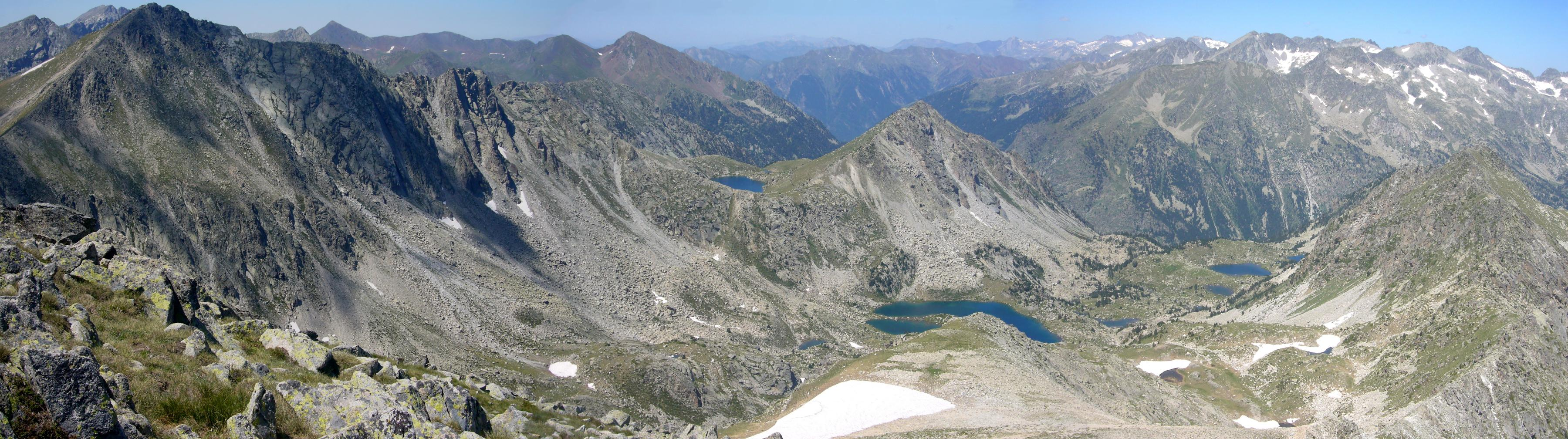 Vall de Dellui vista de camí de la cresta les Pales de Cubieso, la Vall de Boí, Alta Ribagorça, Catalunya.